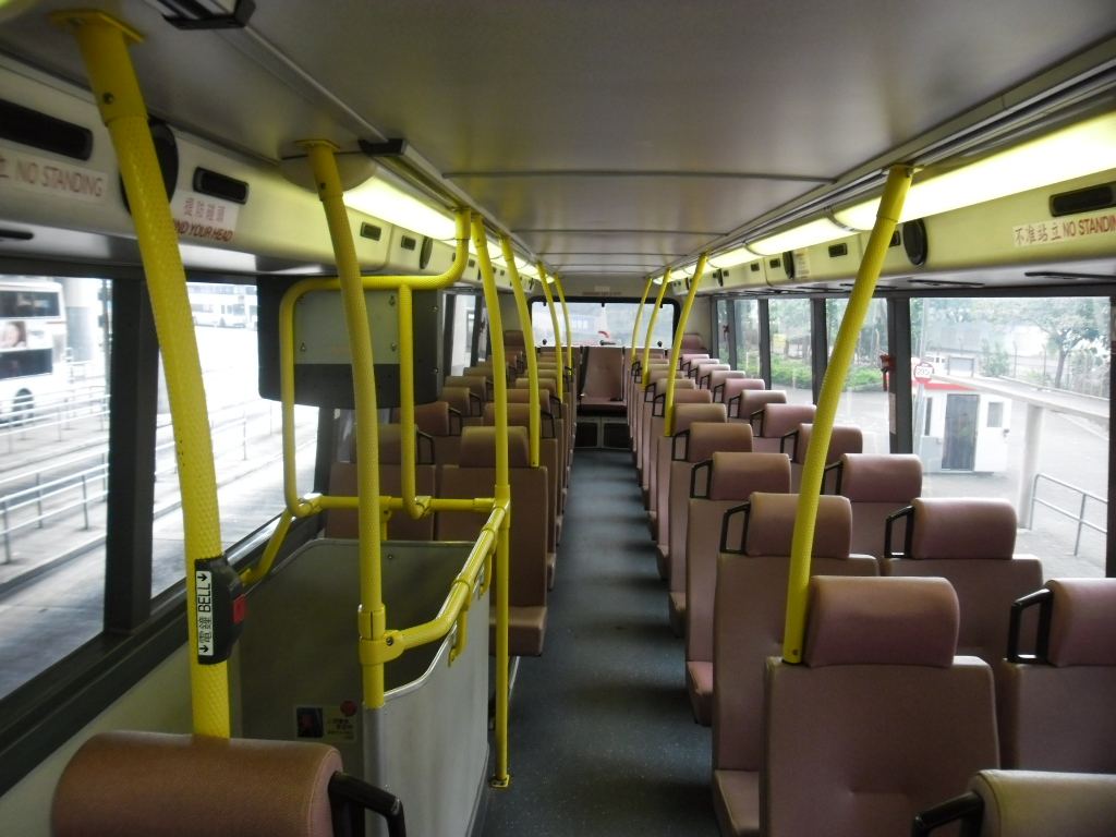 中文（香港）: 九巴一輛ALX500車身巴士的上層車廂